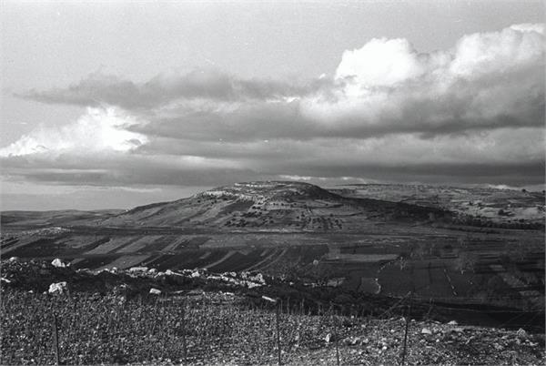 גוש חלב - מראה כללי.